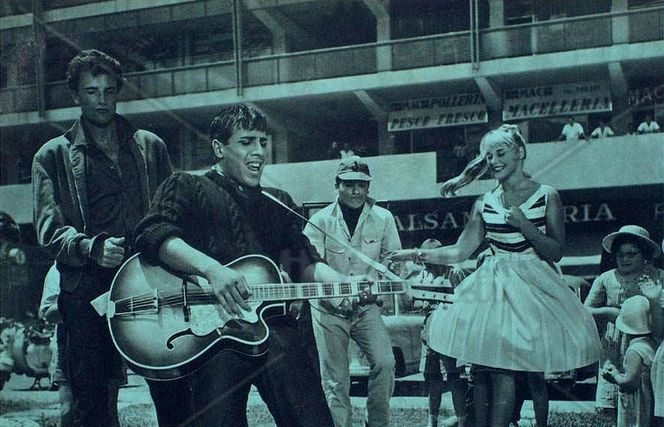 Ragazzi del Juke-Box